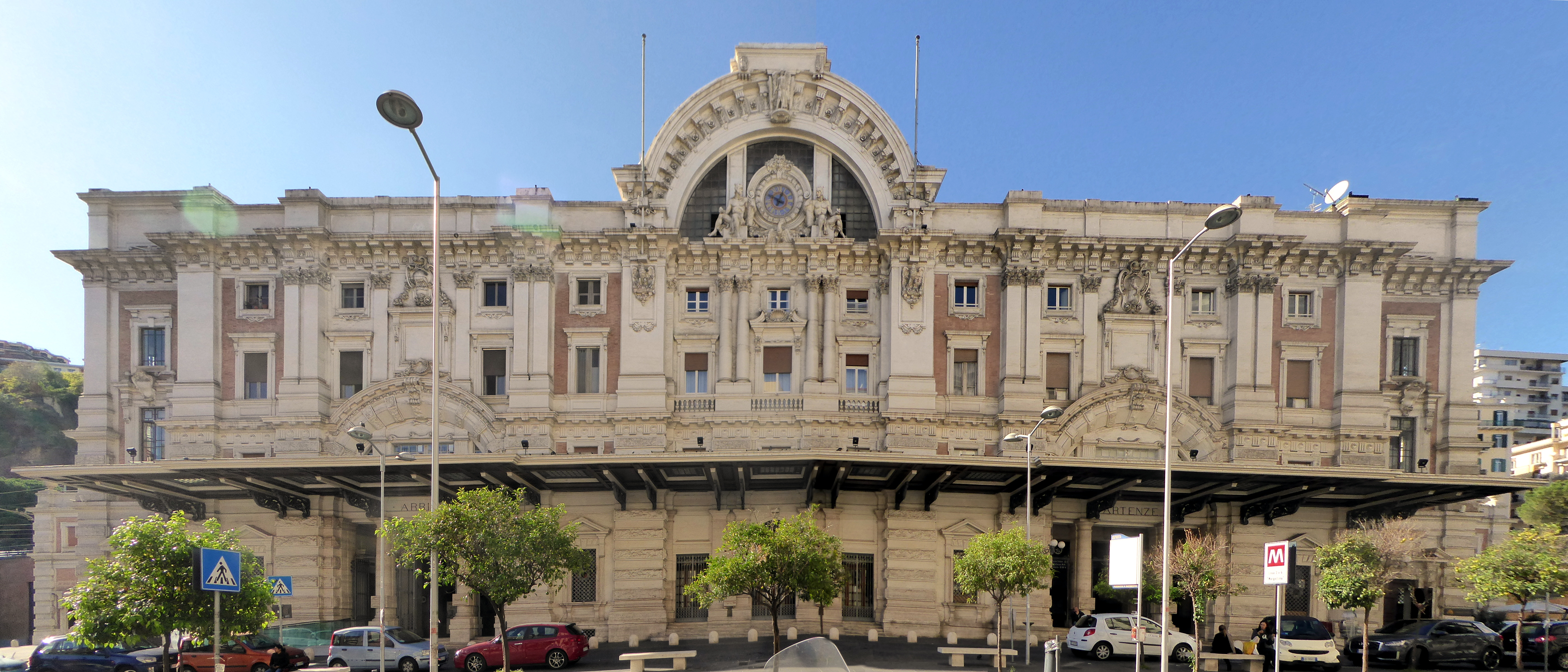 Neapel, Bahnhof Mergellina, von Osten gesehen.